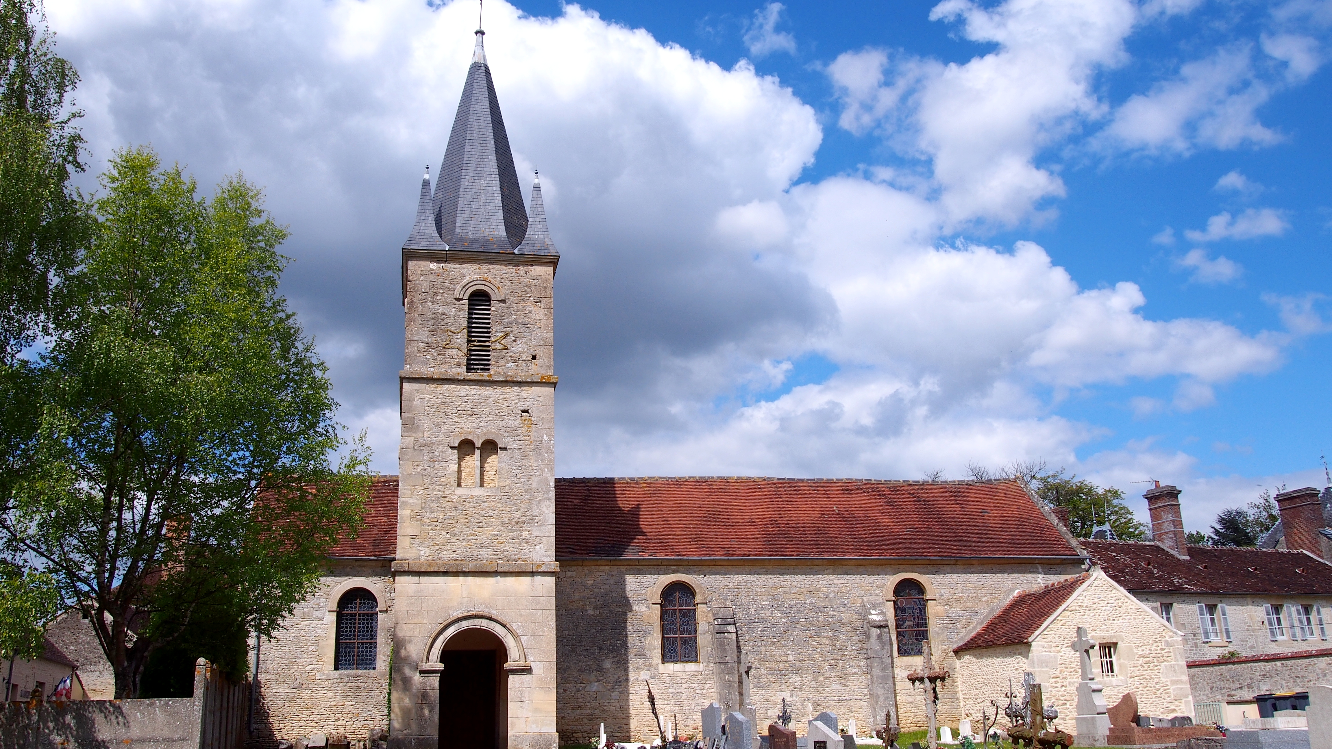 Sévigny (Normandie, France). L'église Saint-Brice.